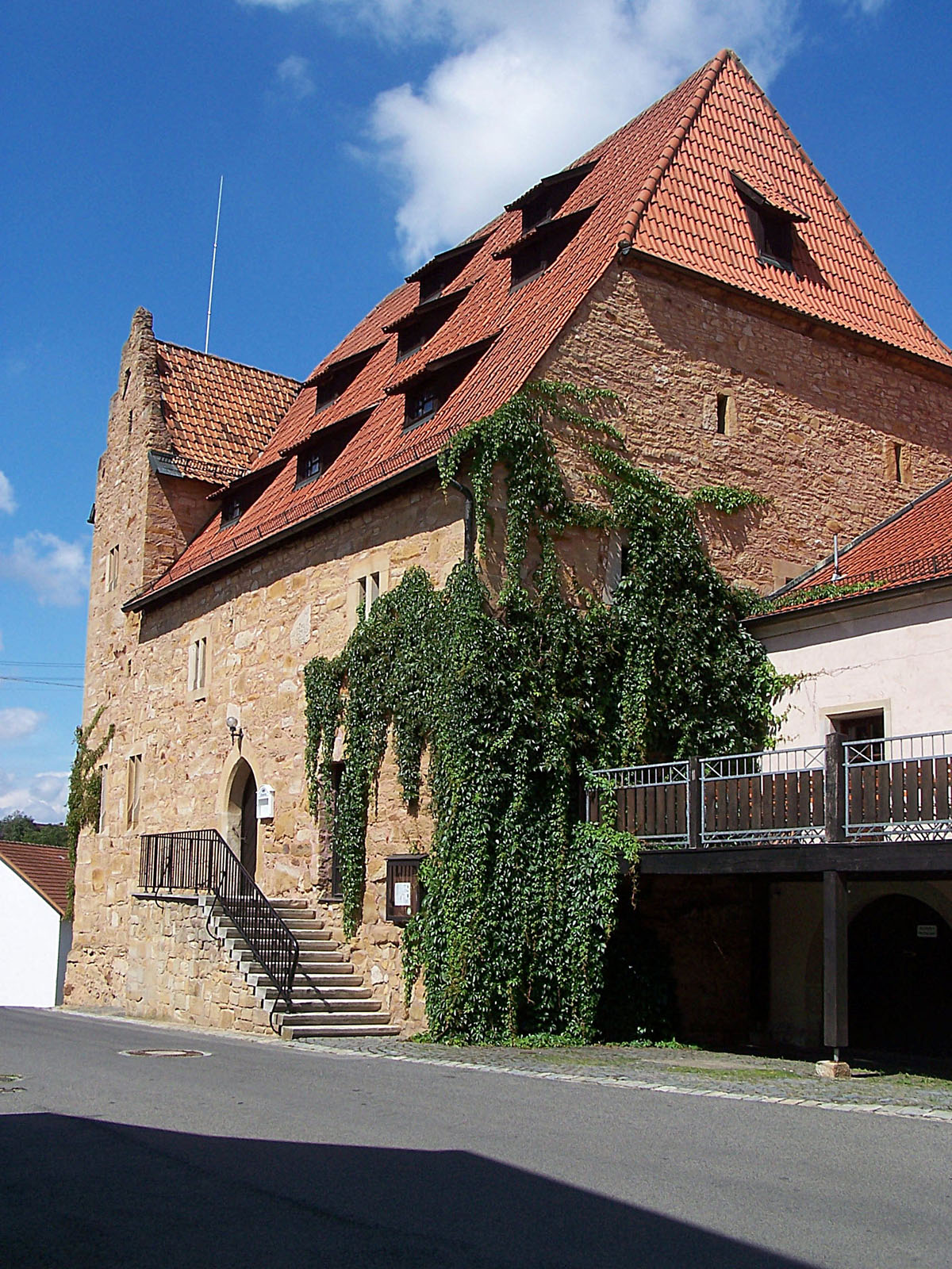 Höchheim Bibra custom house